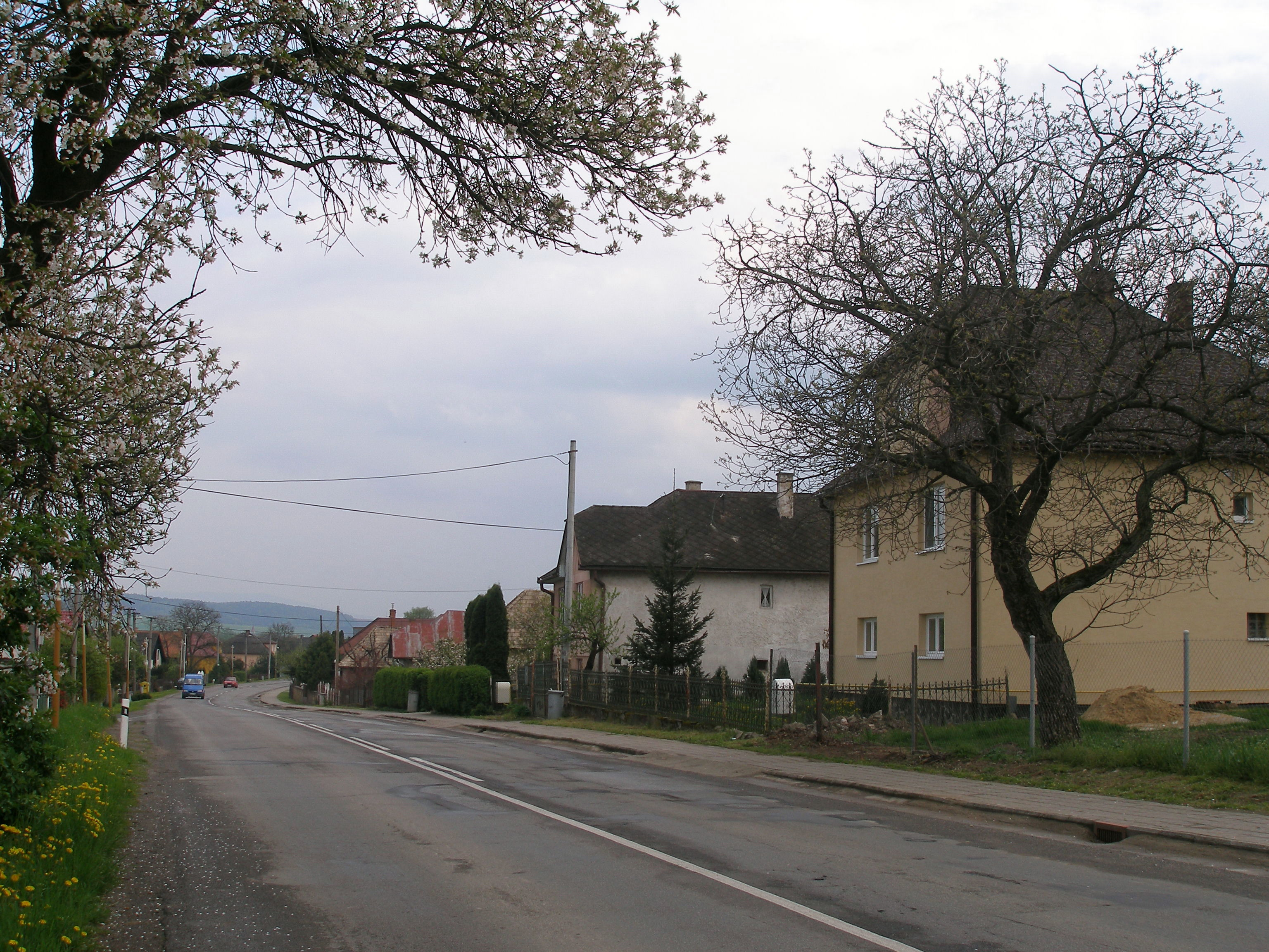 Obec Bretejovce okres Prešov región Šariš